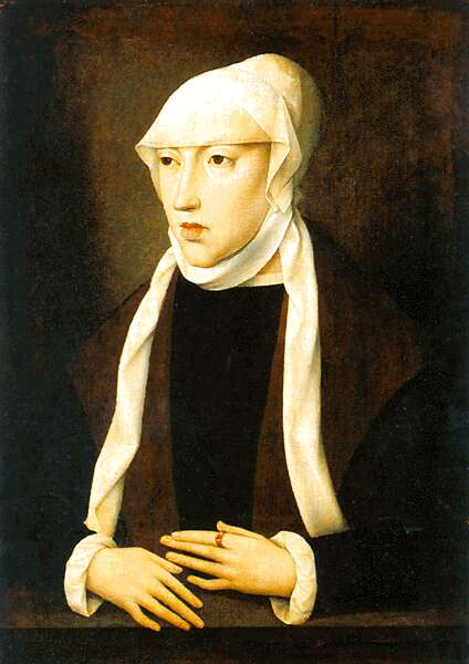 Maria Kцnigin Van Hongarije tussen keizers en kunstenaars 1505-1558